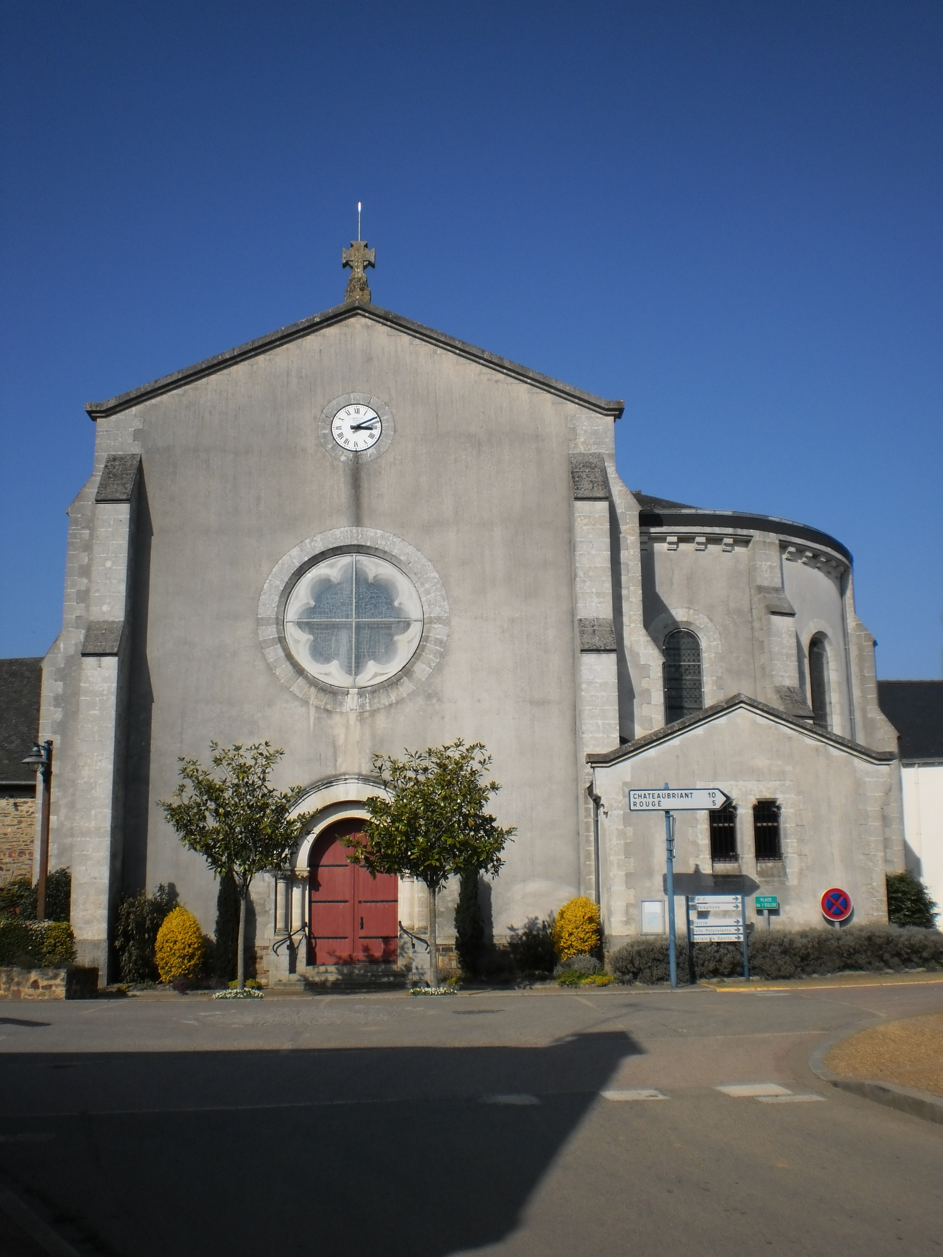 Ruffigné (Loire-Atlantique, France) - église, côté sud